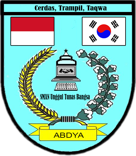 Logo Terbaru SMAN Unggul Tunas Bangsa Aceh Barat Daya